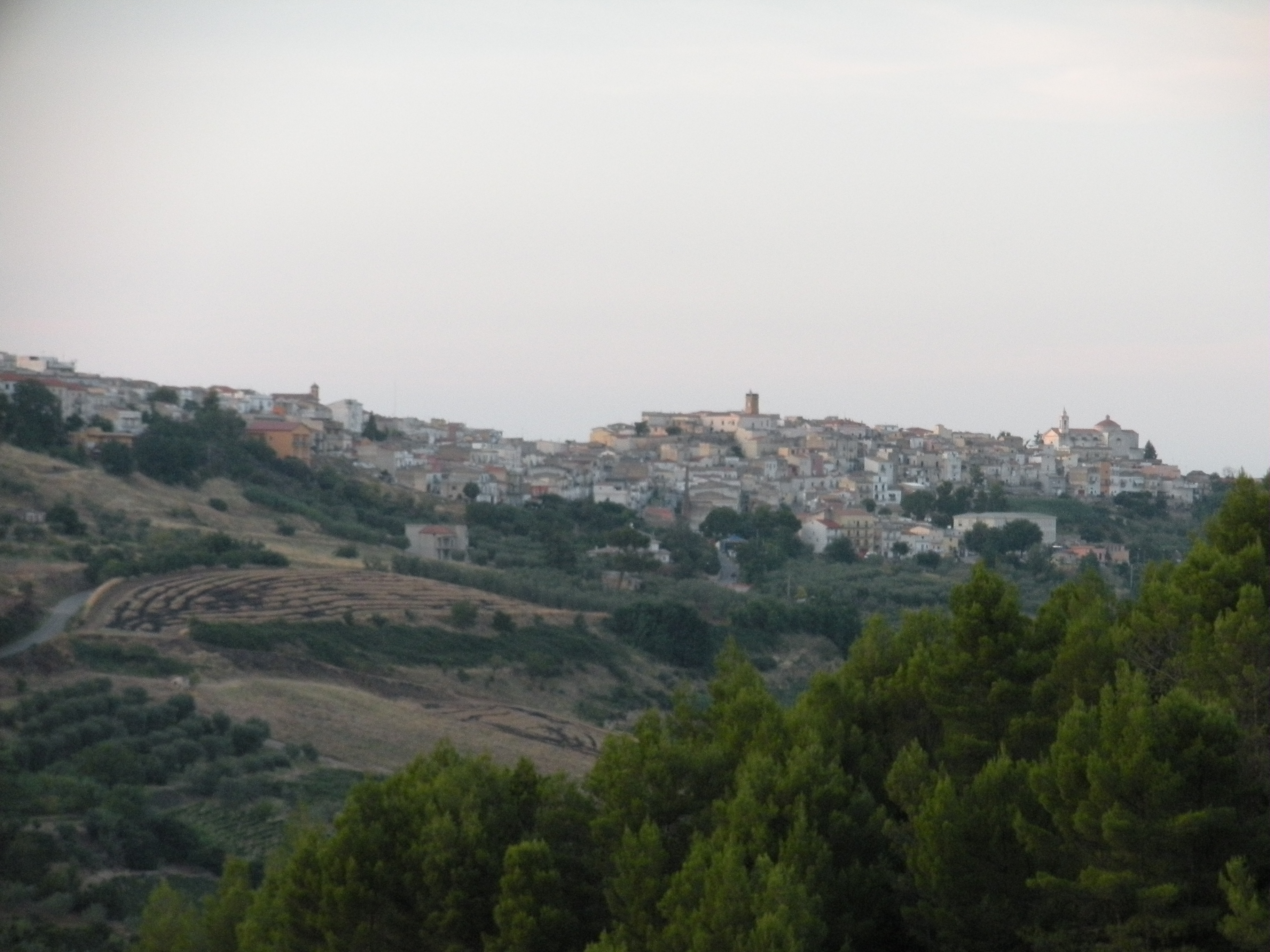 Montemilone - Panorama